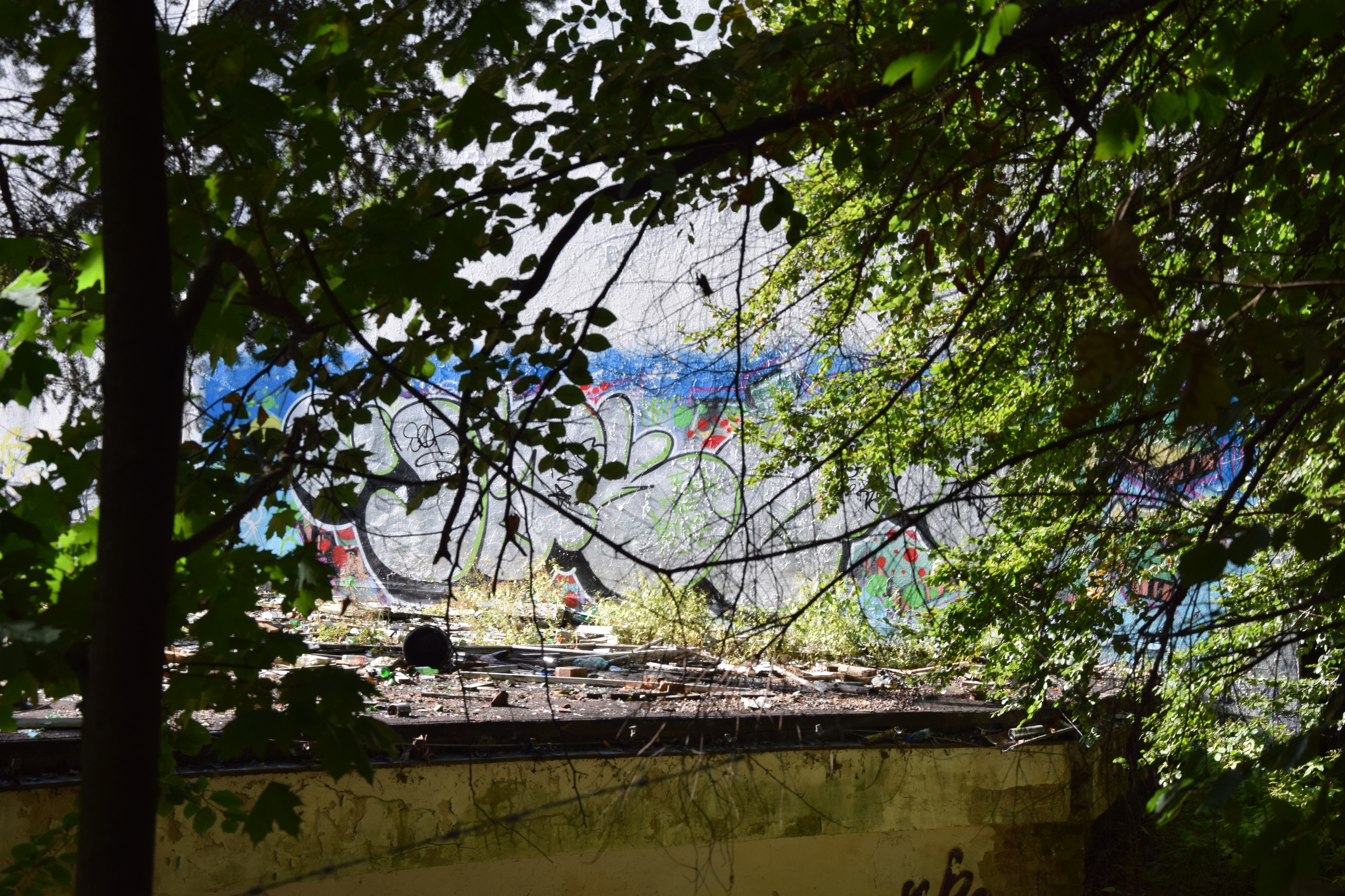 Graffiti na ścianie opuszczonego sanatorium w Gdyni